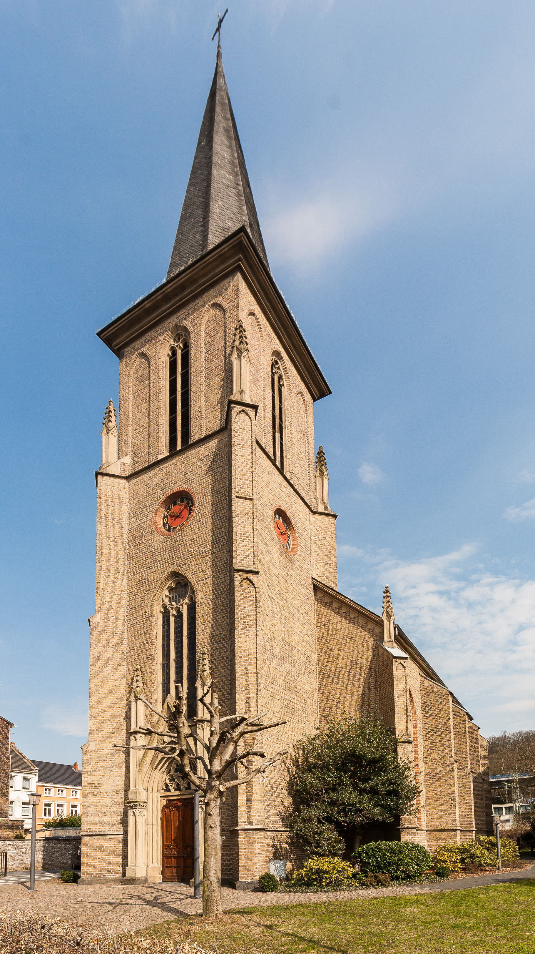 Christuskirche, Grabenstraße 10, Königswinter